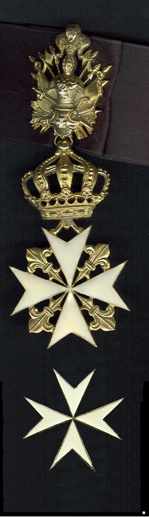 Een kruis uit mijn verzameling. Er berust geen auteursrecht op deze door mij gemaakte en bewerkte scan. Robert Prummel 28 mei 2006 00:46 (CEST)